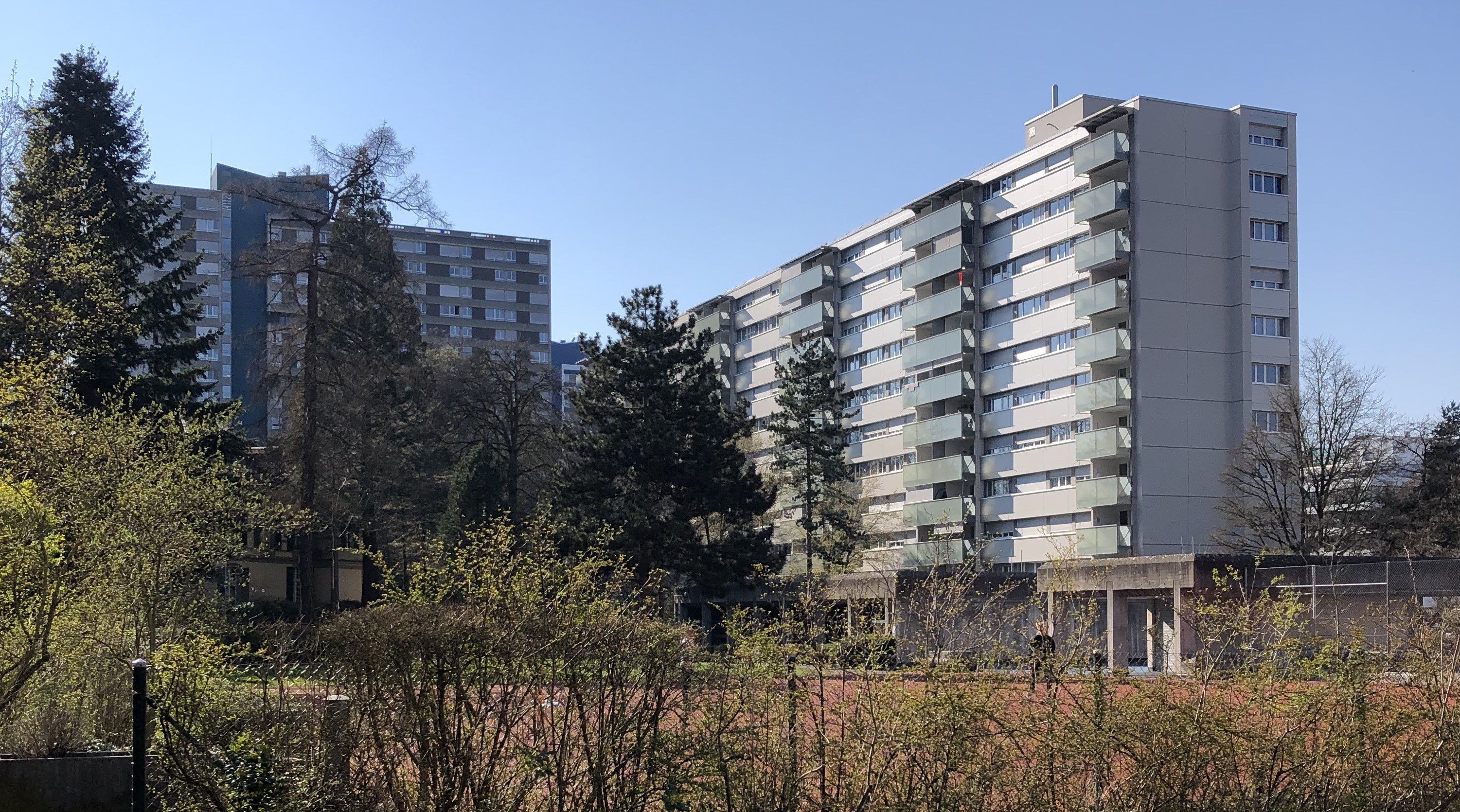 Fellergut Bebauung